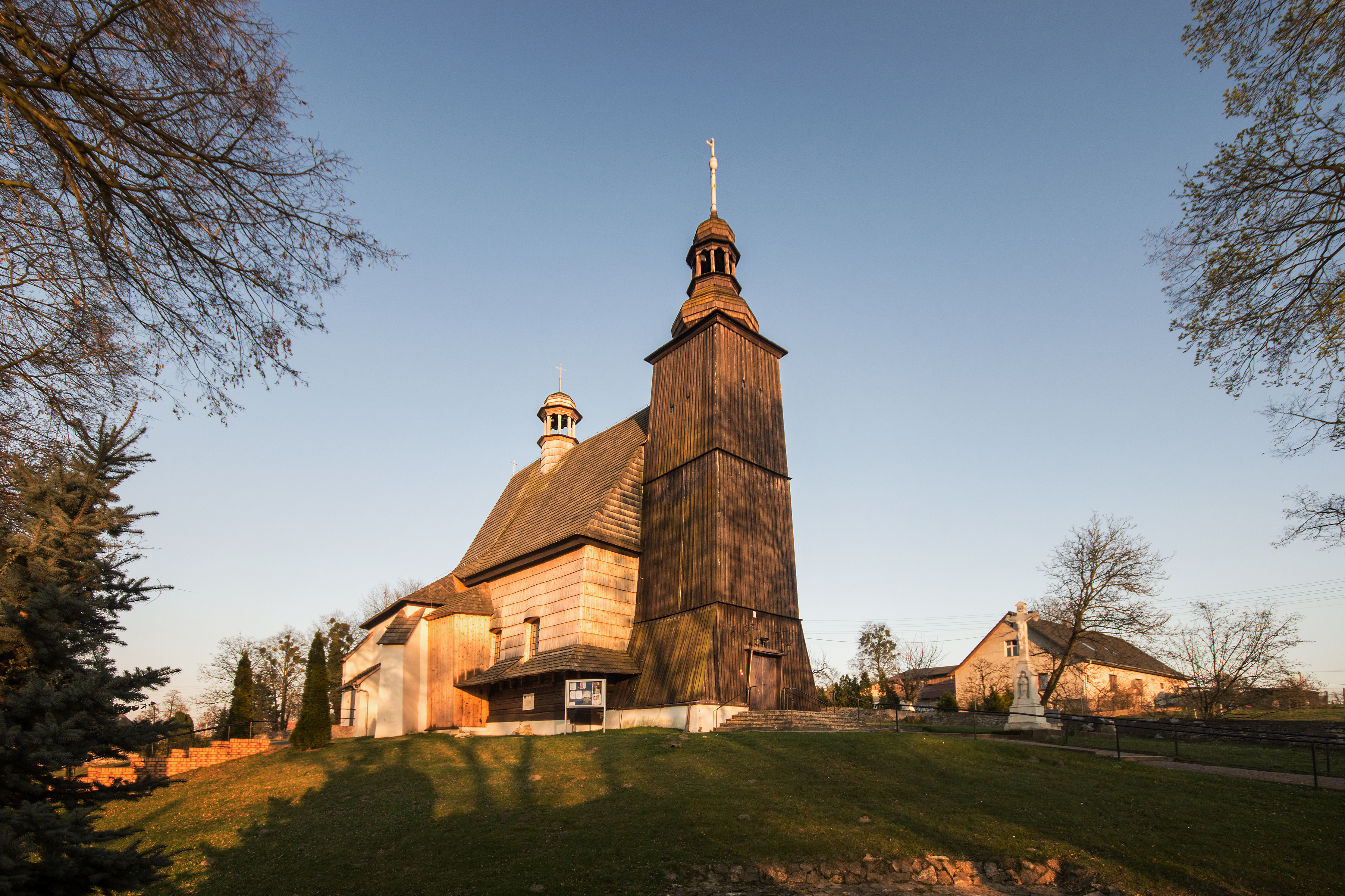 Sieroty, kościół par. p.w. Wszystkich Świętych, 1470, 1707, 1770